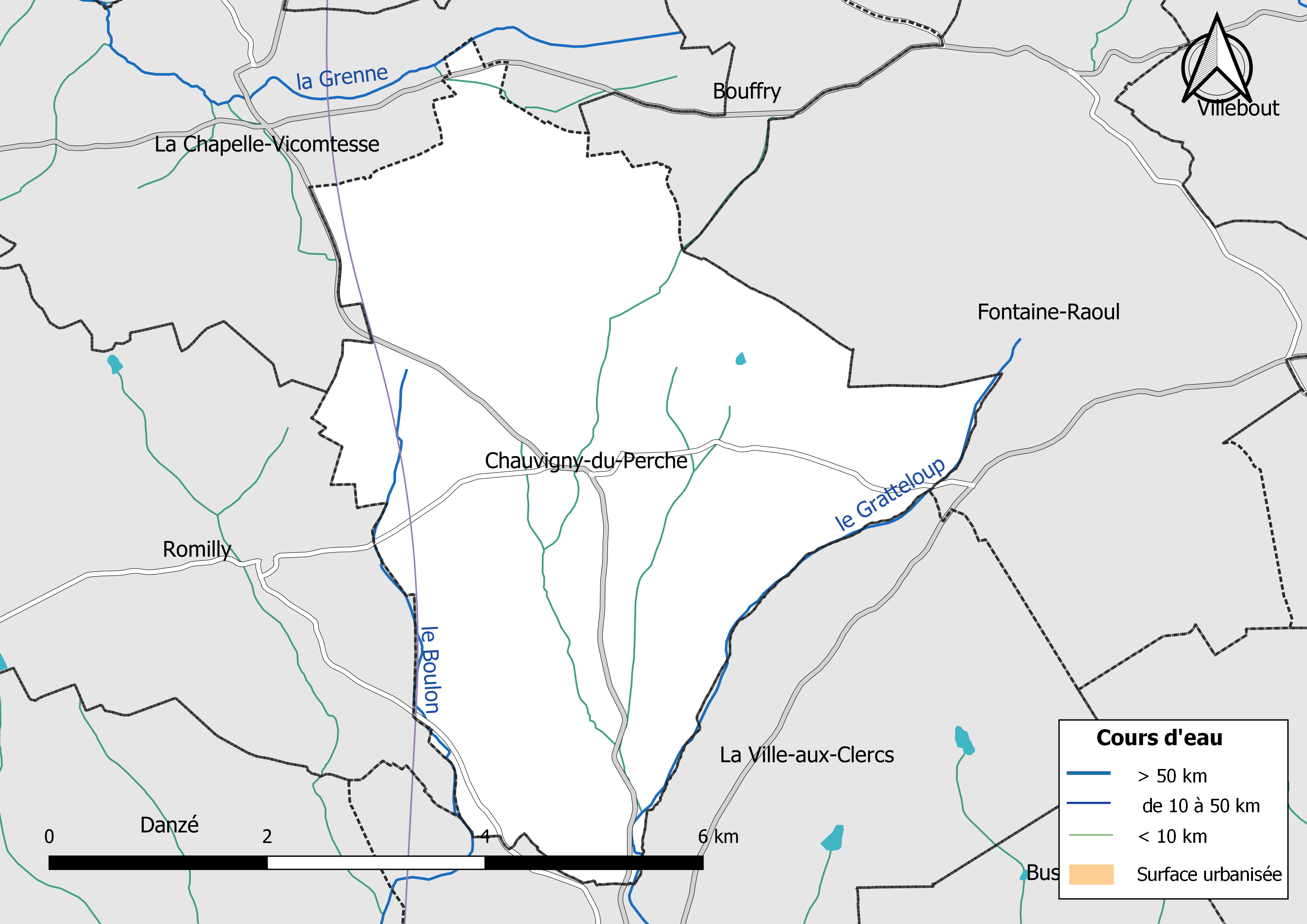 Carte du réseau hydrographique de la commune de Chauvigny-du-Perche (Loir-et-Cher, France).